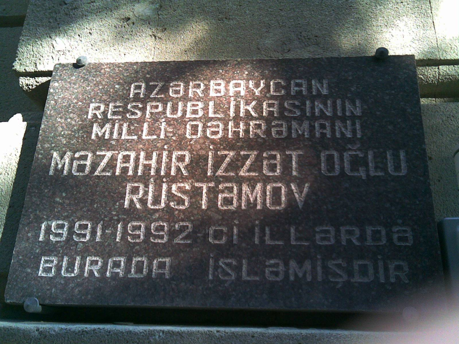 Məzahir Rüstəmov üçün xatirə lövhəsi